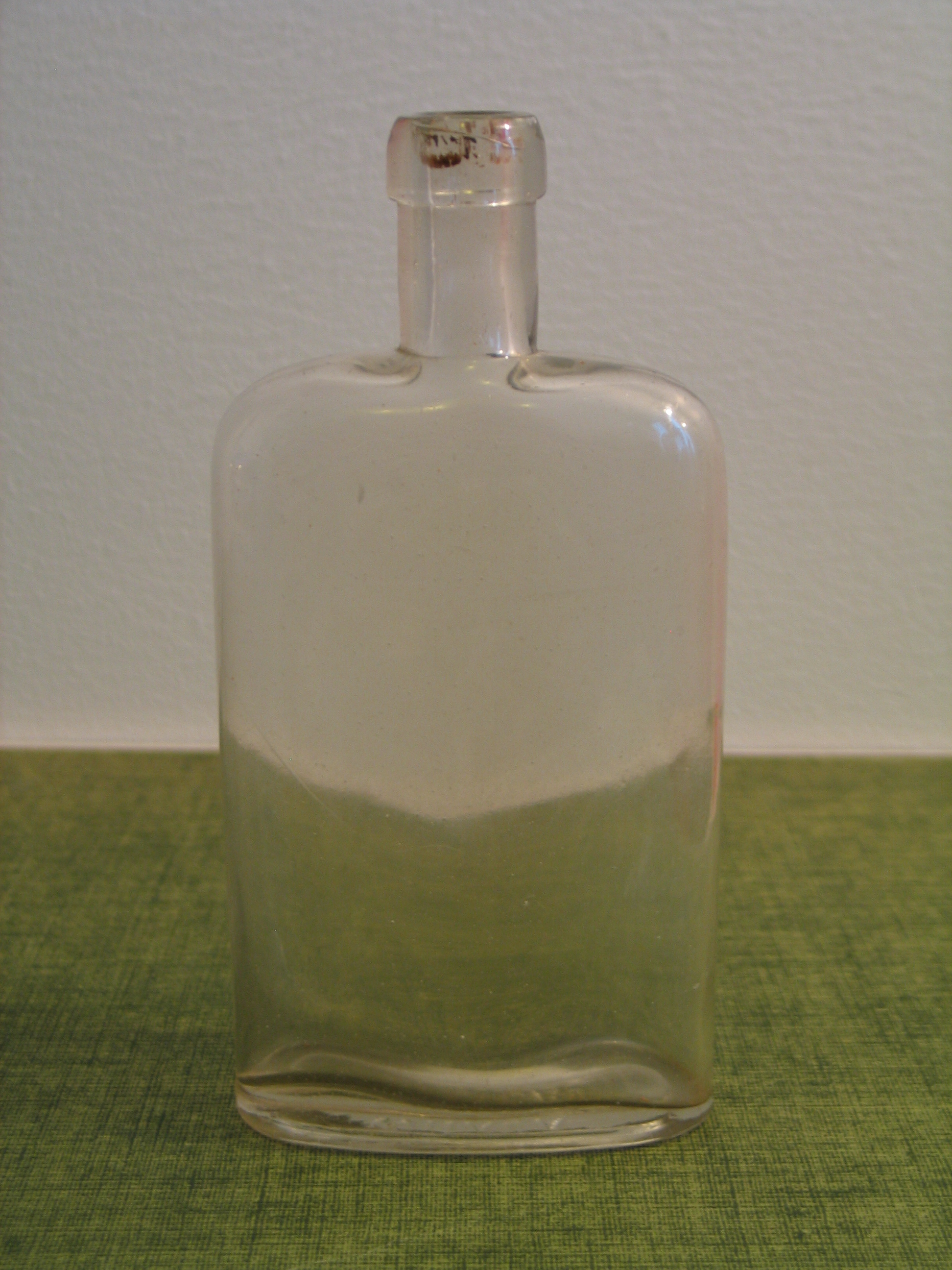 Wiialan lasitehtaan (1890-1938) valmistama taskupullo